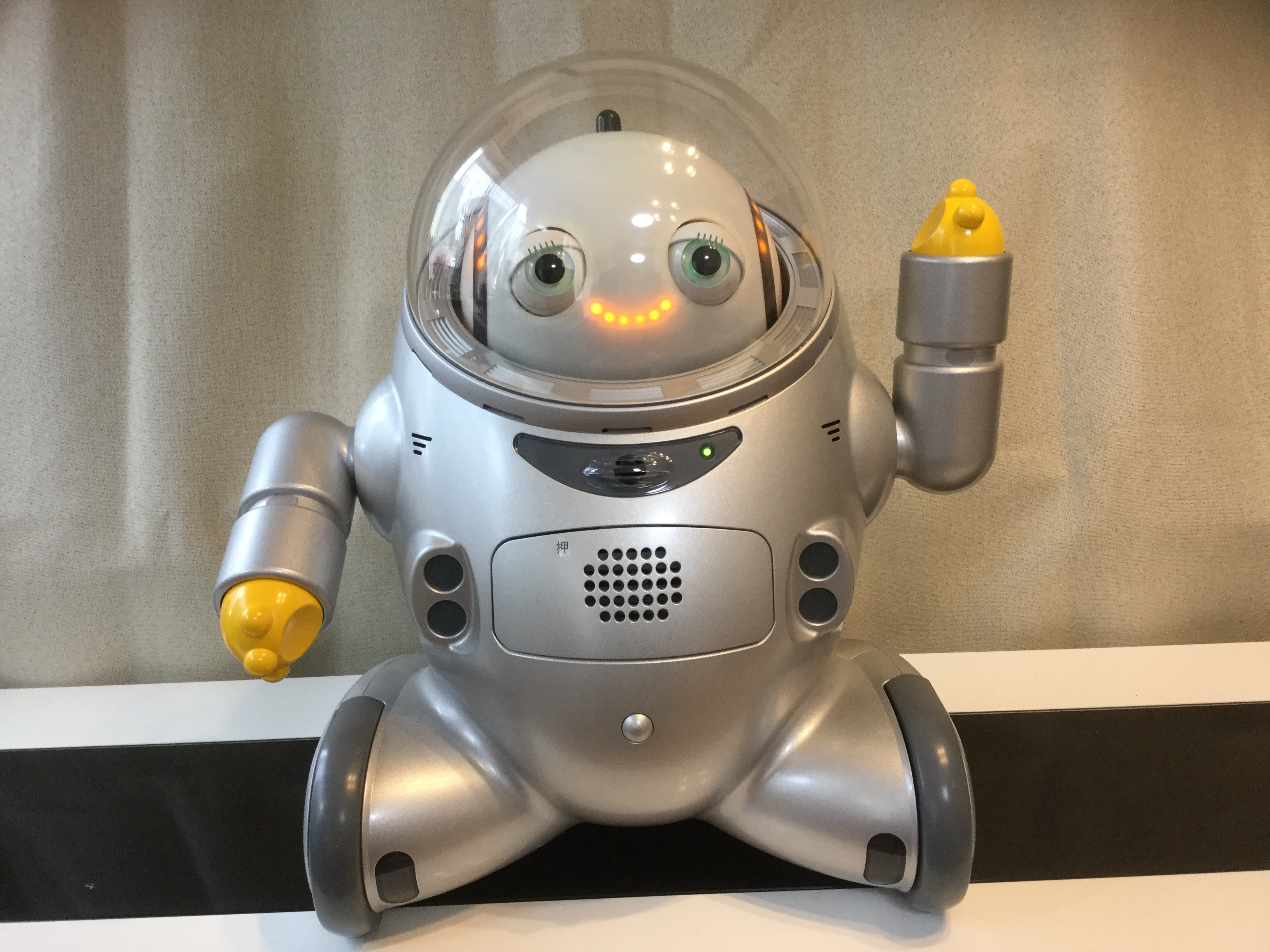 品名：よりそいifbot SIZE：高さ445x 幅430 x 奥行358mm／重量：約8.1g 可動部：眼/2軸左右独立/瞼/2軸左右独立/首/2軸 内臓センサ：マイク/音声認識マイク1個/音源検知マイク1個 握手センサ/スイッチ2個 スイッチ：起動/終了スイッチ 調整機能：音声ボリューム 電源：公称電圧DC24V/消費電力75W